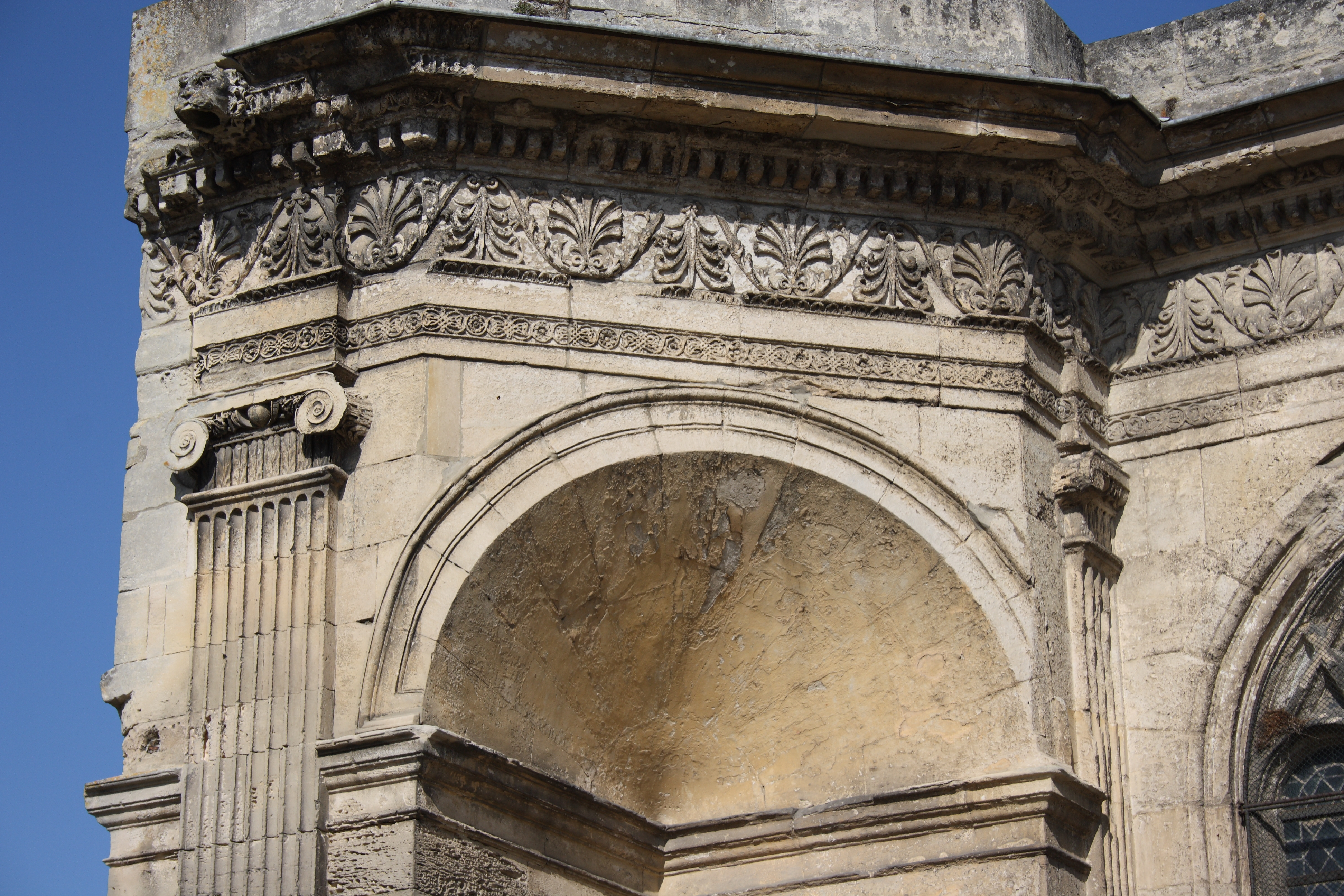 Renaissancefassade der Kirche Notre-Dame-de-la-Nativité in Magny-en-Vexin